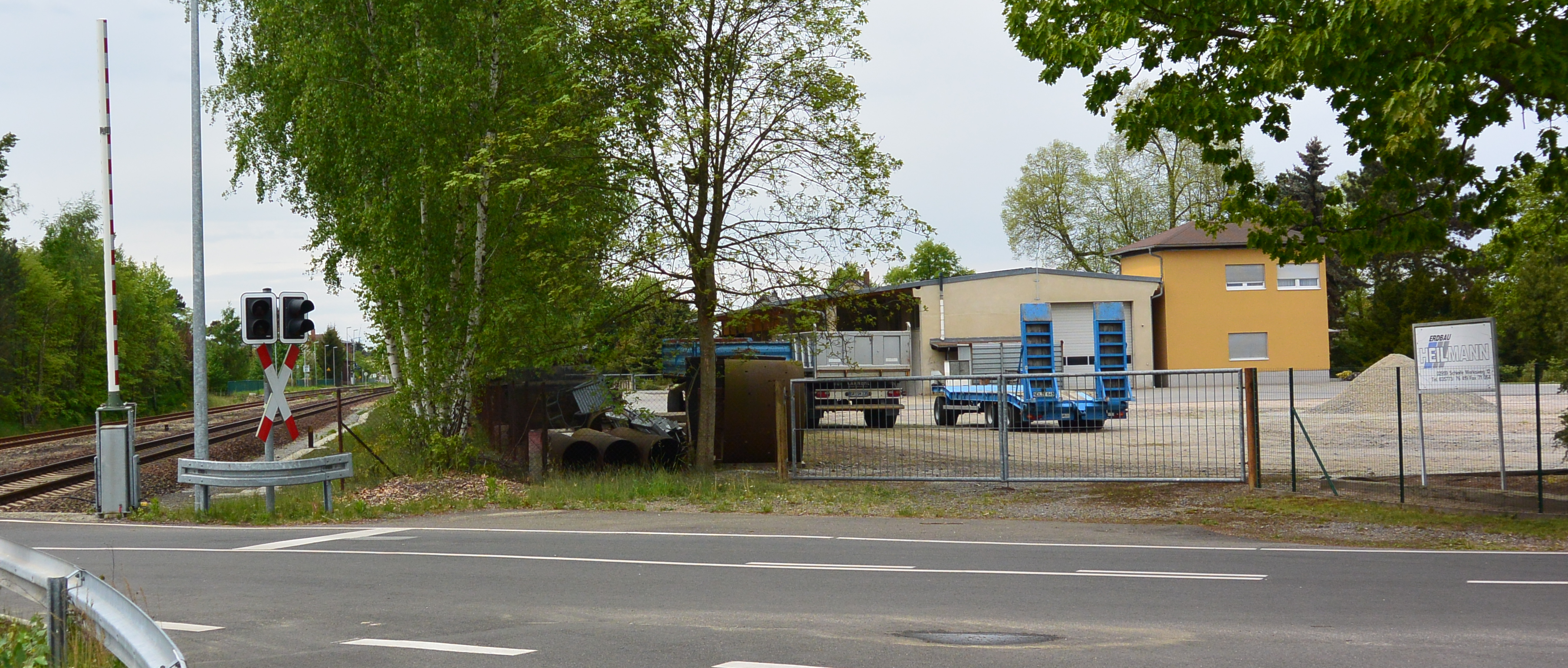 Gelände von Erdbau Heilmann (früheres Sägewerk Lorenz) in Schleife an der Berlin-Görlitzer Bahn, der Bahnhof Schleife befindet sich im Hintergrund zwischen dem Andreaskreuz und den Birken.